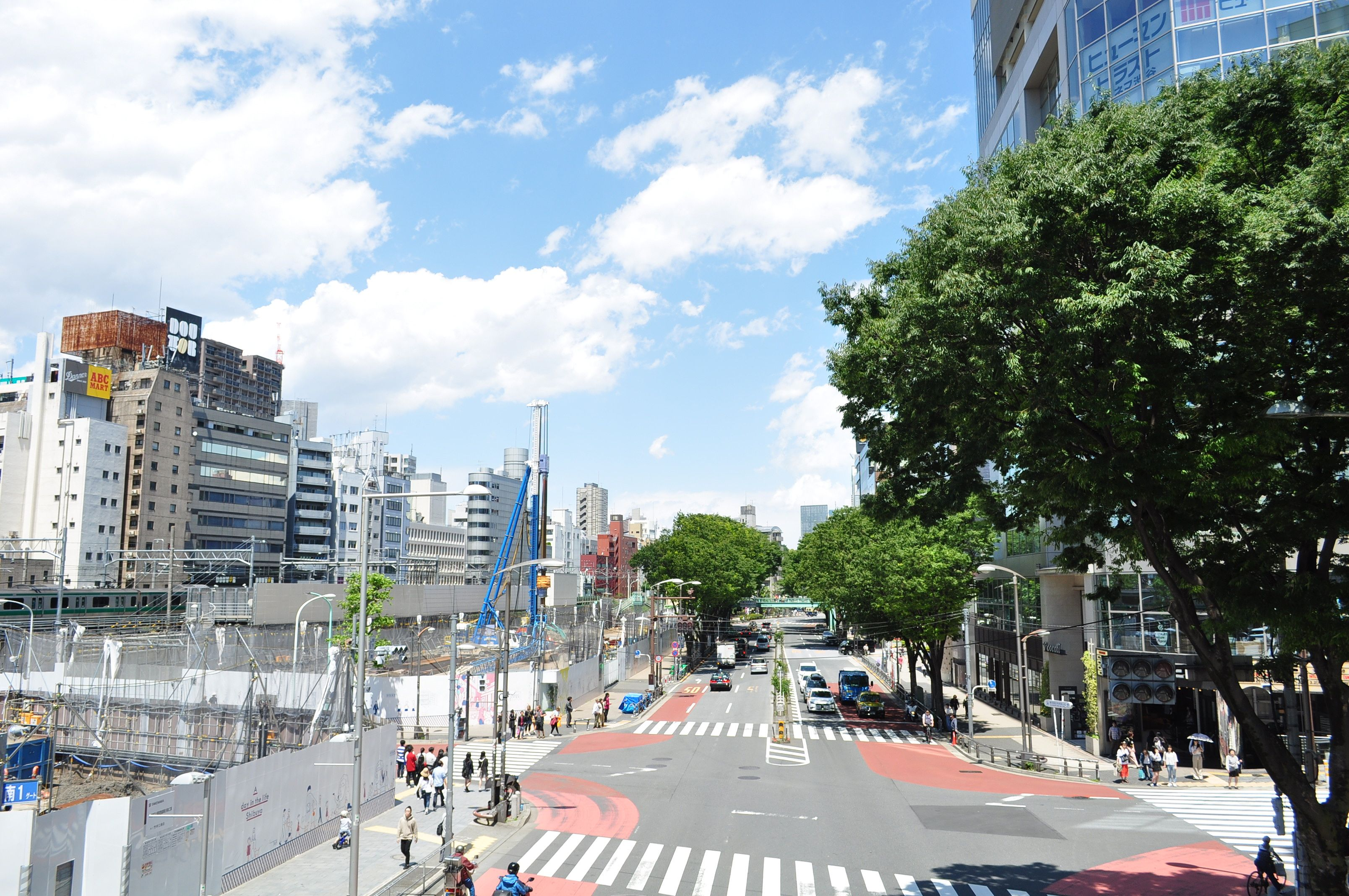 明治通り 宮下公園交差点